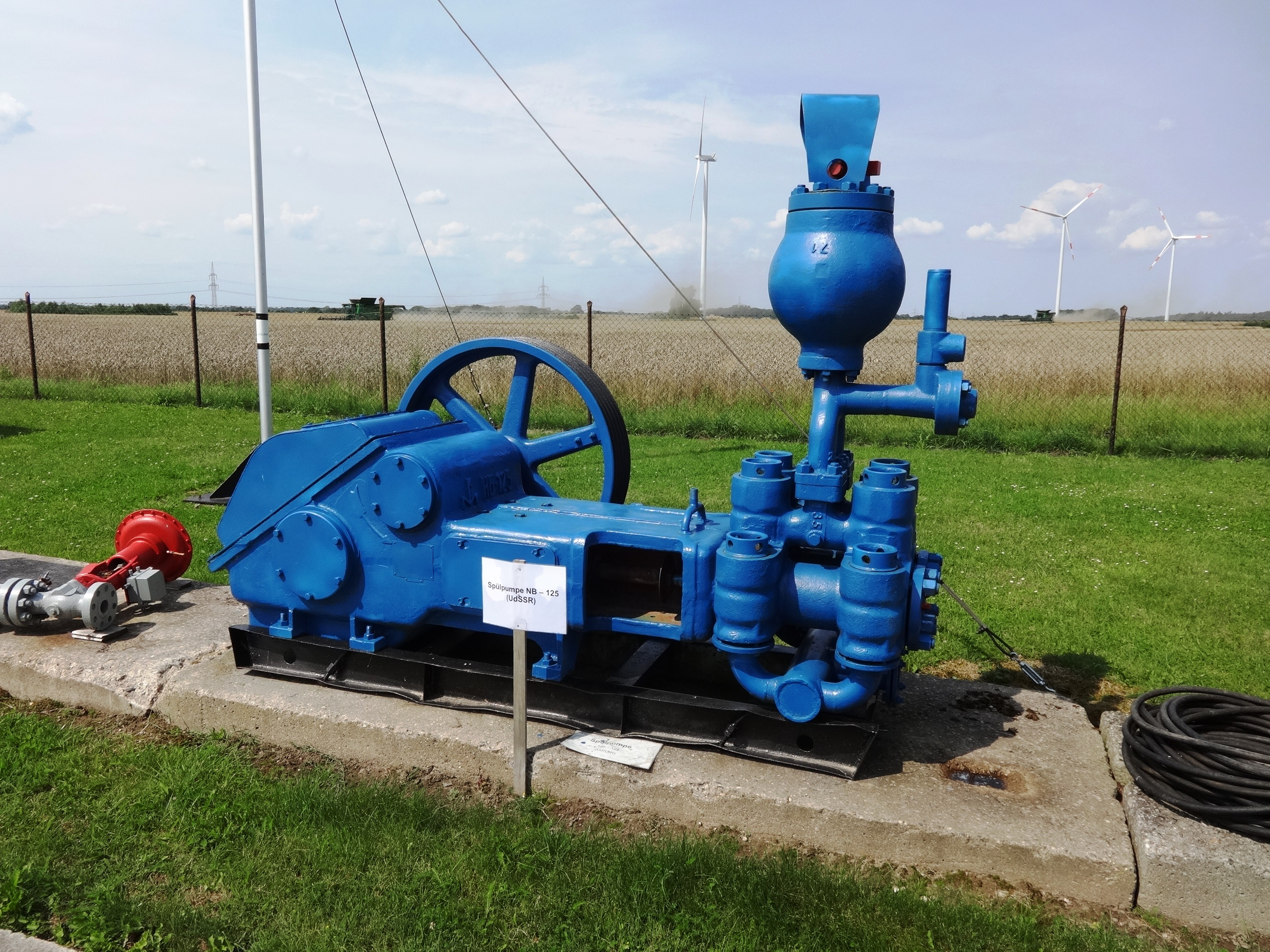 Erdölmuseum und Heimatstube in Reinkenhagen, Gemeinde Sundhagen in Mecklenburg-Vorpommern Der Raum um Grimmen und Reinkenhagen war von 1961 bis 1996 eines der größten norddeutschen Erdölfördergebiete auf dem Gebiet der DDR. Das Museum beschreibt die technischen Vorgänge, die Erdölförderung und ist am Standort der ersten erdölfündigen Bohrung Reinkenhagen 2/2a/60 eingerichtet. Eine Erdölstraße mit Exponaten führt von Miltzow aus zum Mueseum.